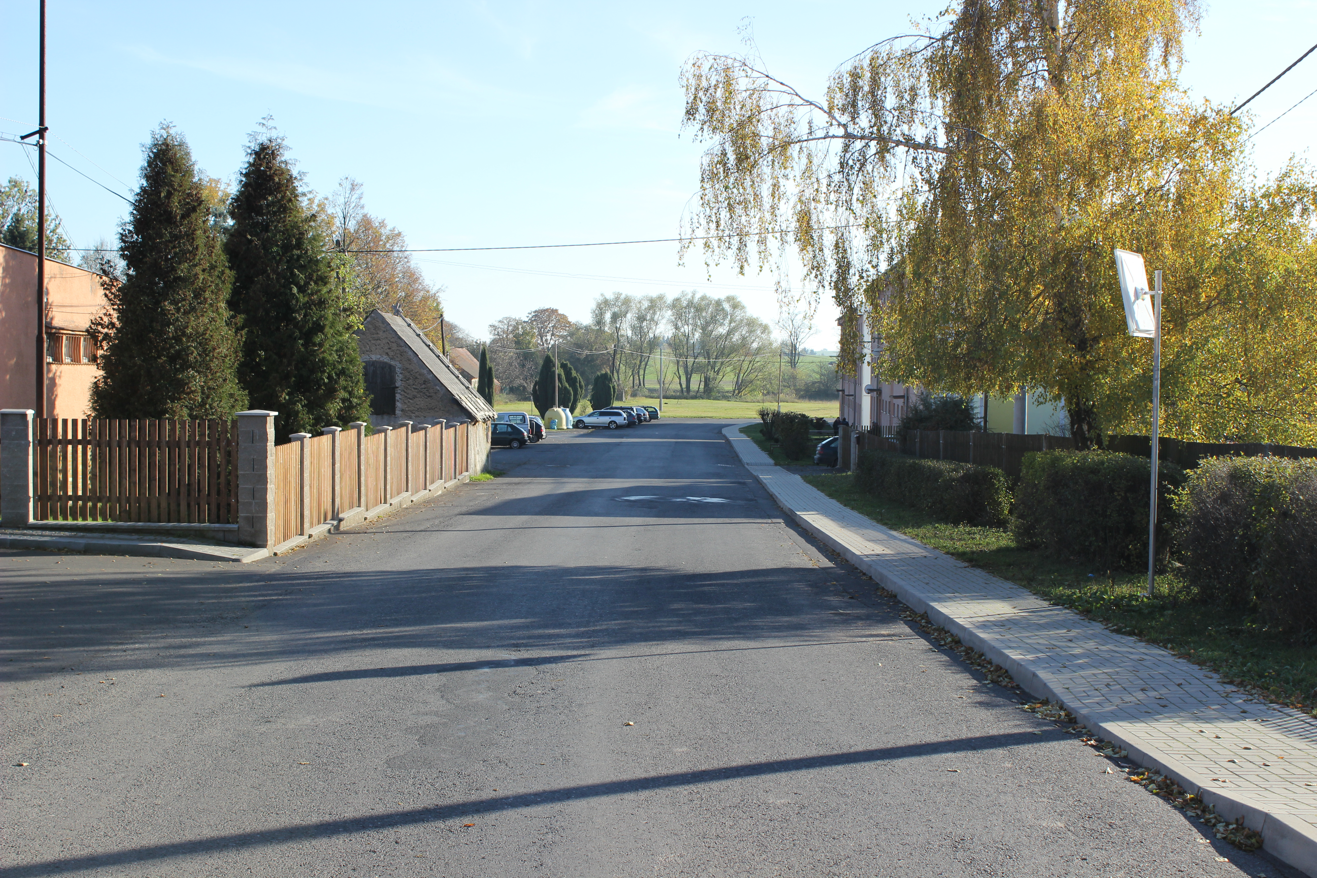 Pohled na jižní partie obce Čichalov.